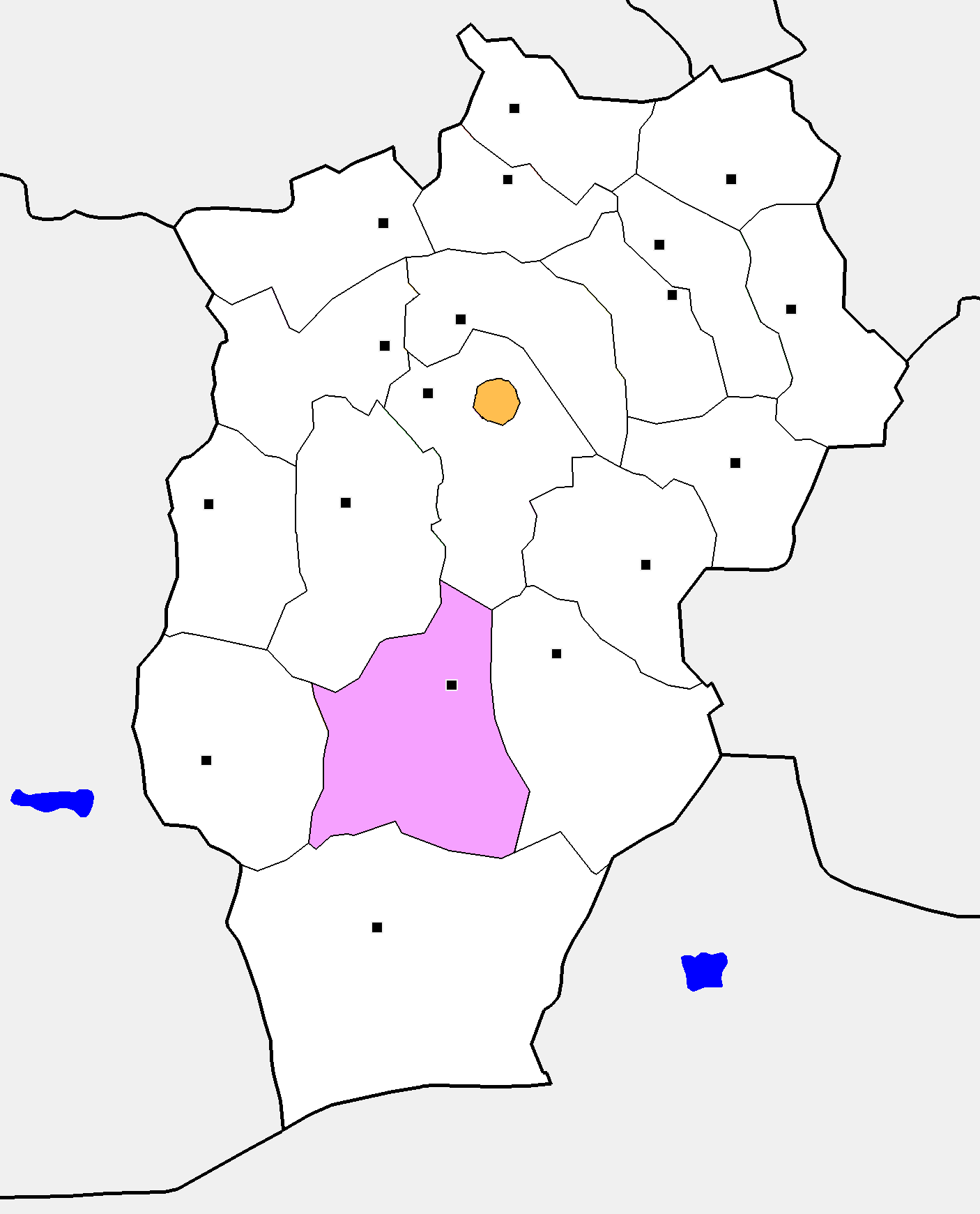 Монгол: Өвөрхангай аймгийн Гучин-Ус сумын байршил